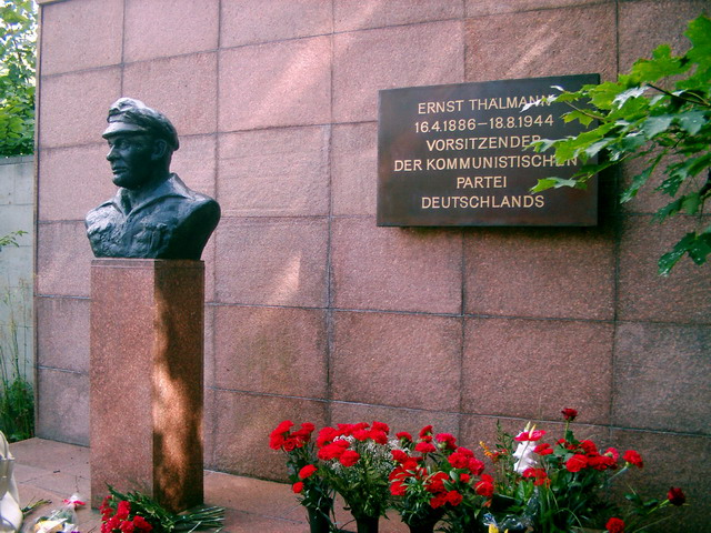 Thälmann-Denkmal auf dem Gelände der Gedenkstätte / Thälmann-Denkmal in Ziegenhals